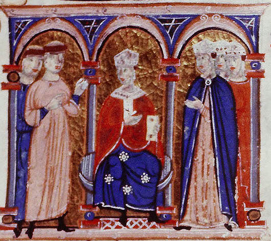 Pope Innocent IV at Council of Lyon